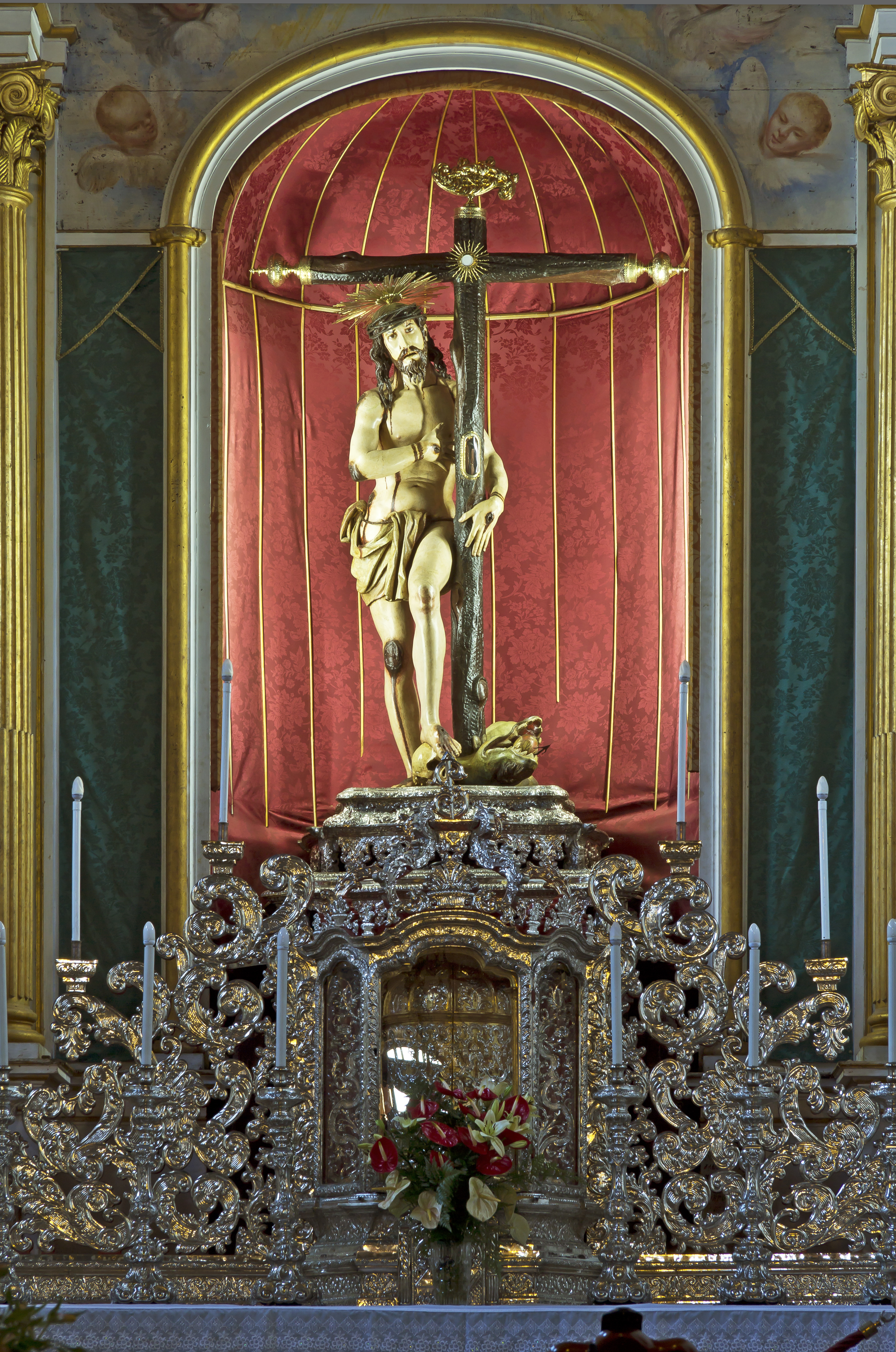 Christusfigur im Hauptaltar der Kirche des ehemaligen Augustinerklosters in Tacoronte, Ansicht ohne Feiertagsausstattung